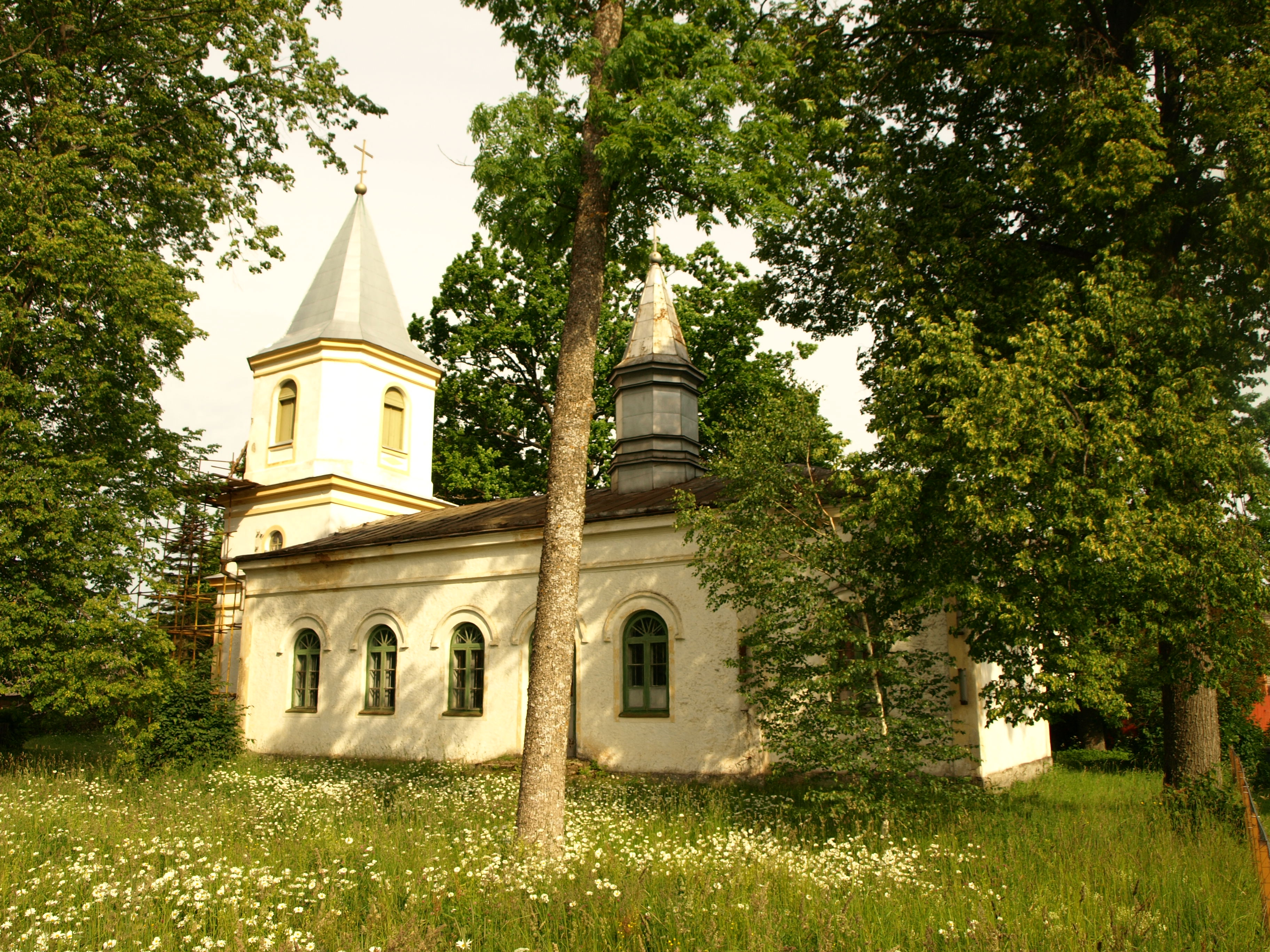 Karksi-Nuia õigeusu kirik